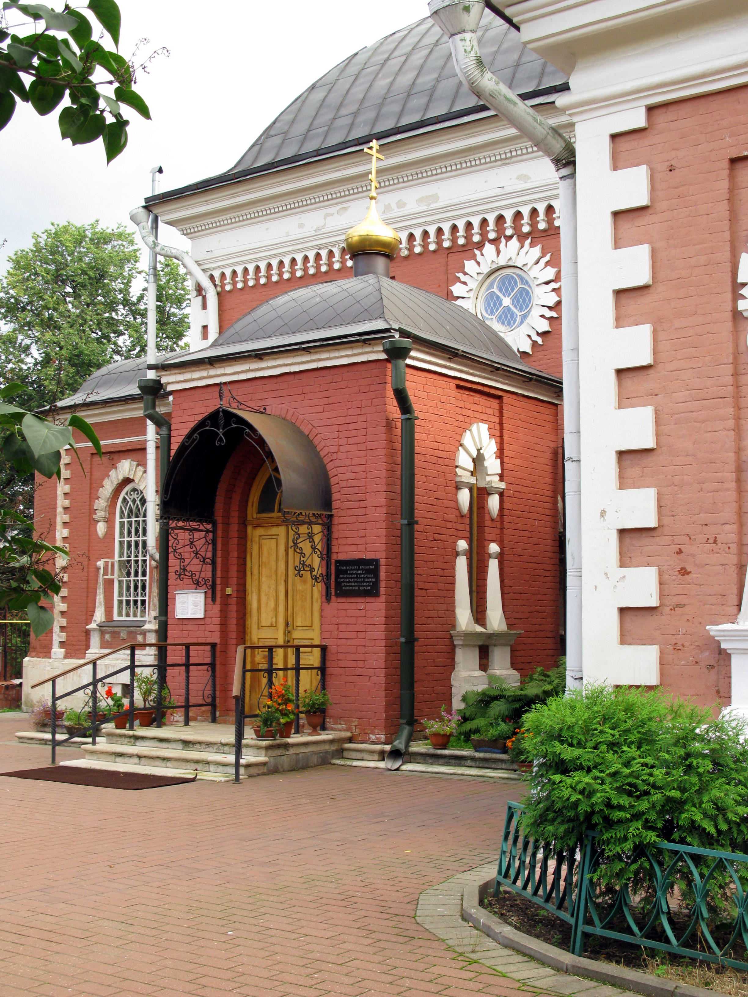 Церковь Николая Чудотворца (Успения Пресвятой Богородицы) на Преображенском кладбище Вход в храм Успения Пресвятой Богородицы Московской Поморской Старообрядческой общины